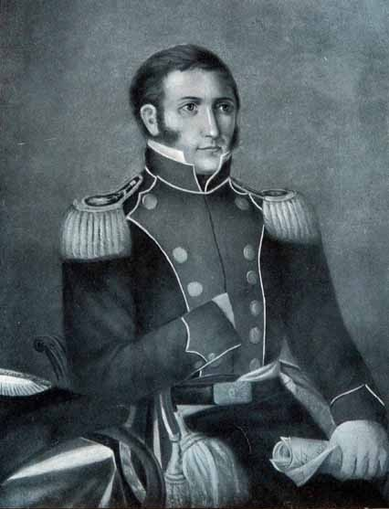 Óleo de autor anónimo pintado en 1828, donado a Rosas por la Sala de Representantes de la Provincia de Buenos Aires